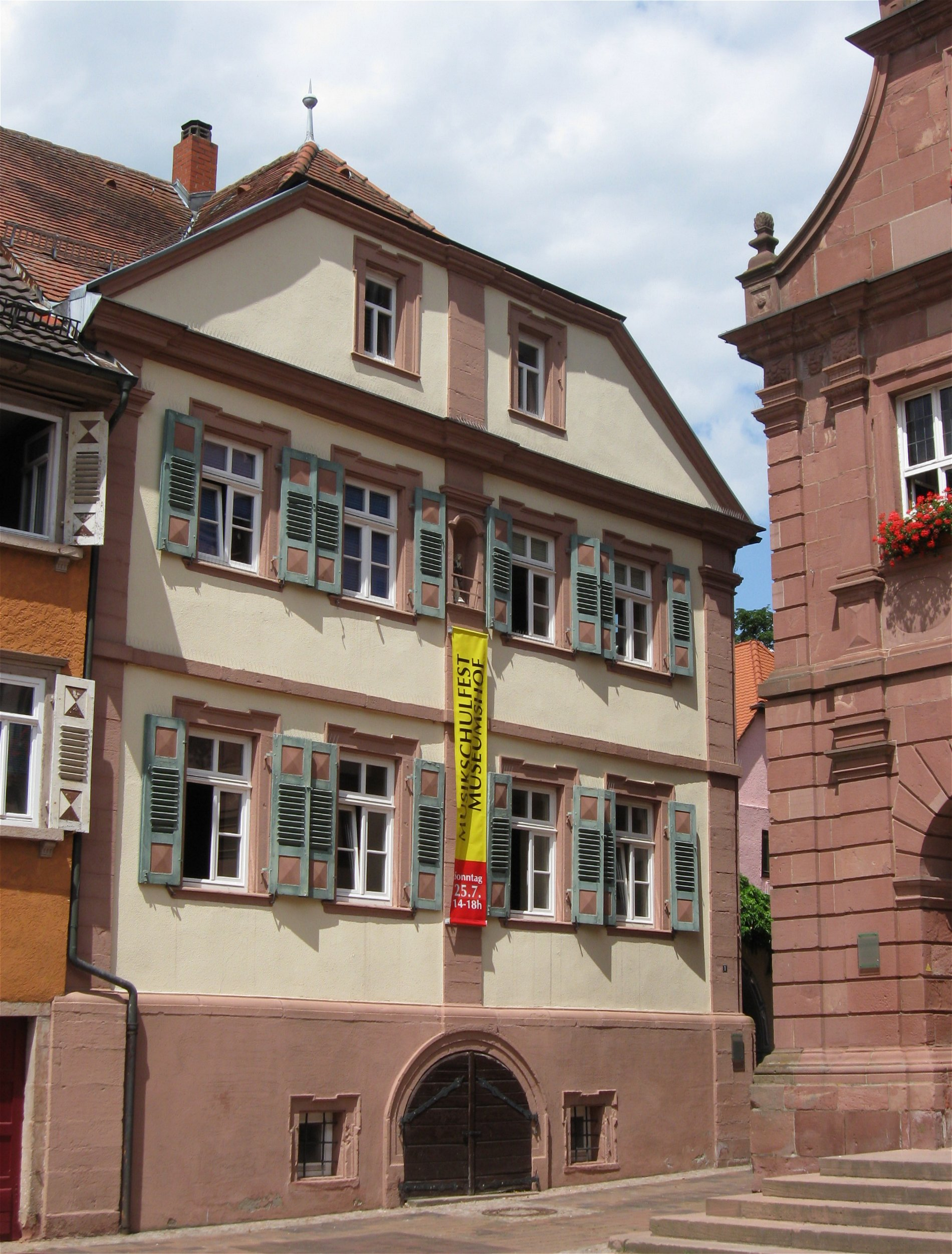 Barockhaus (err. 1719) neben dem Alten Rathaus in Buchen (Odenwald), Baden-Württemberg.